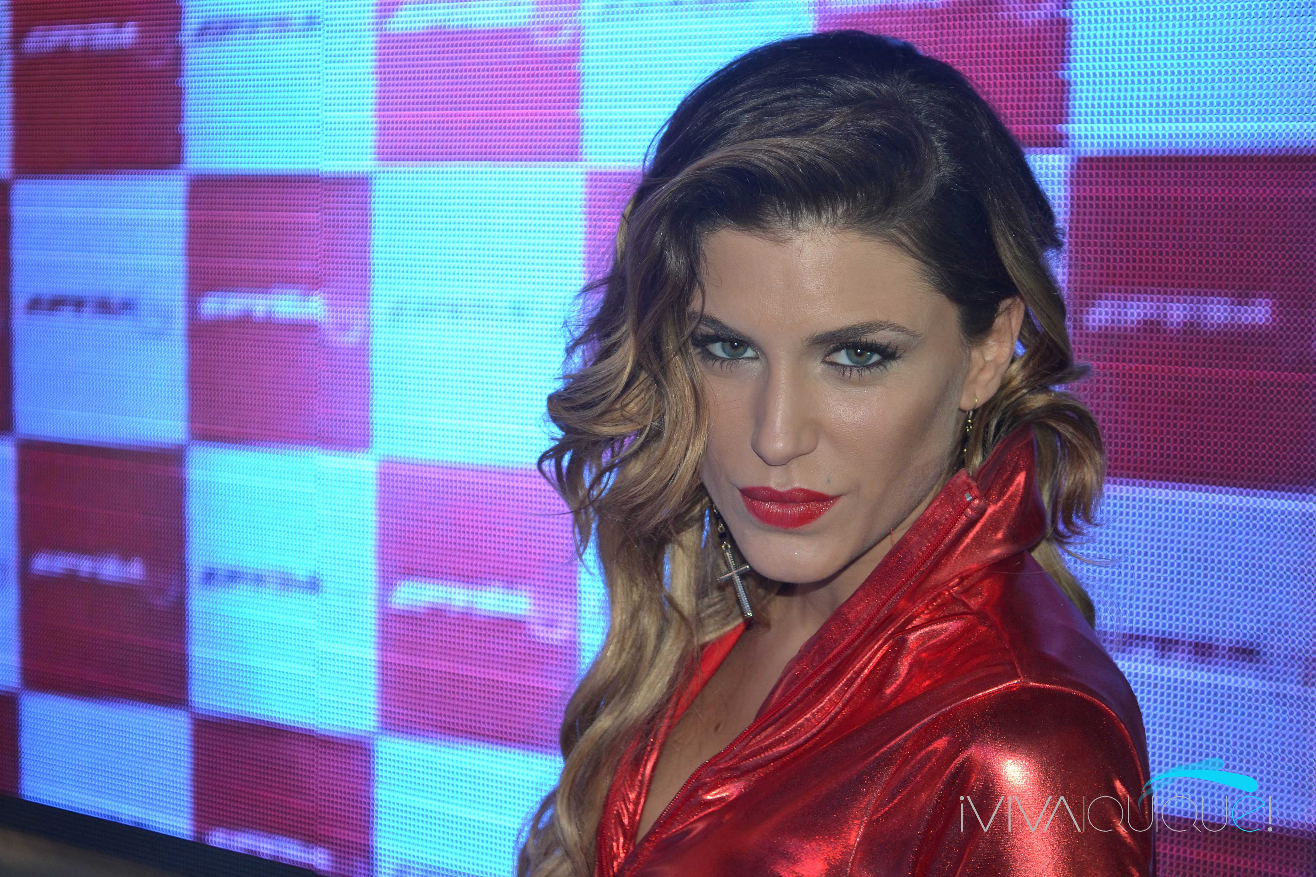 Fotografías: Gabriel Muñoz Ubal.